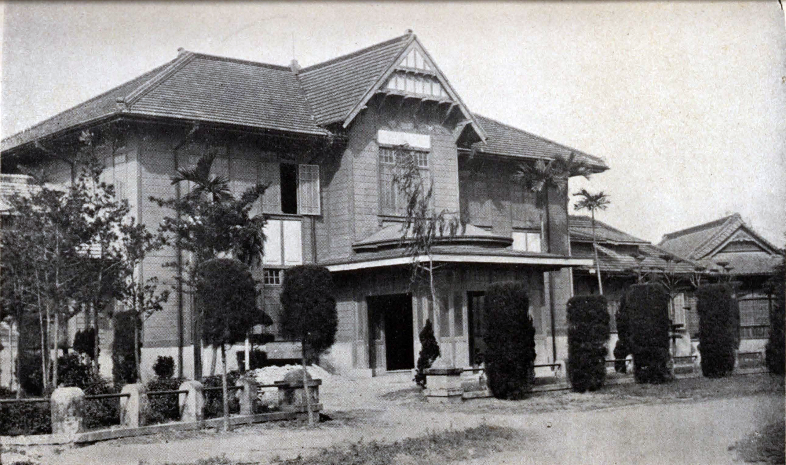 新豐郡役所，位在今臺南市東門圓環附近。圖片翻拍自1937年新豐郡役所出的《新豐郡要覽》。